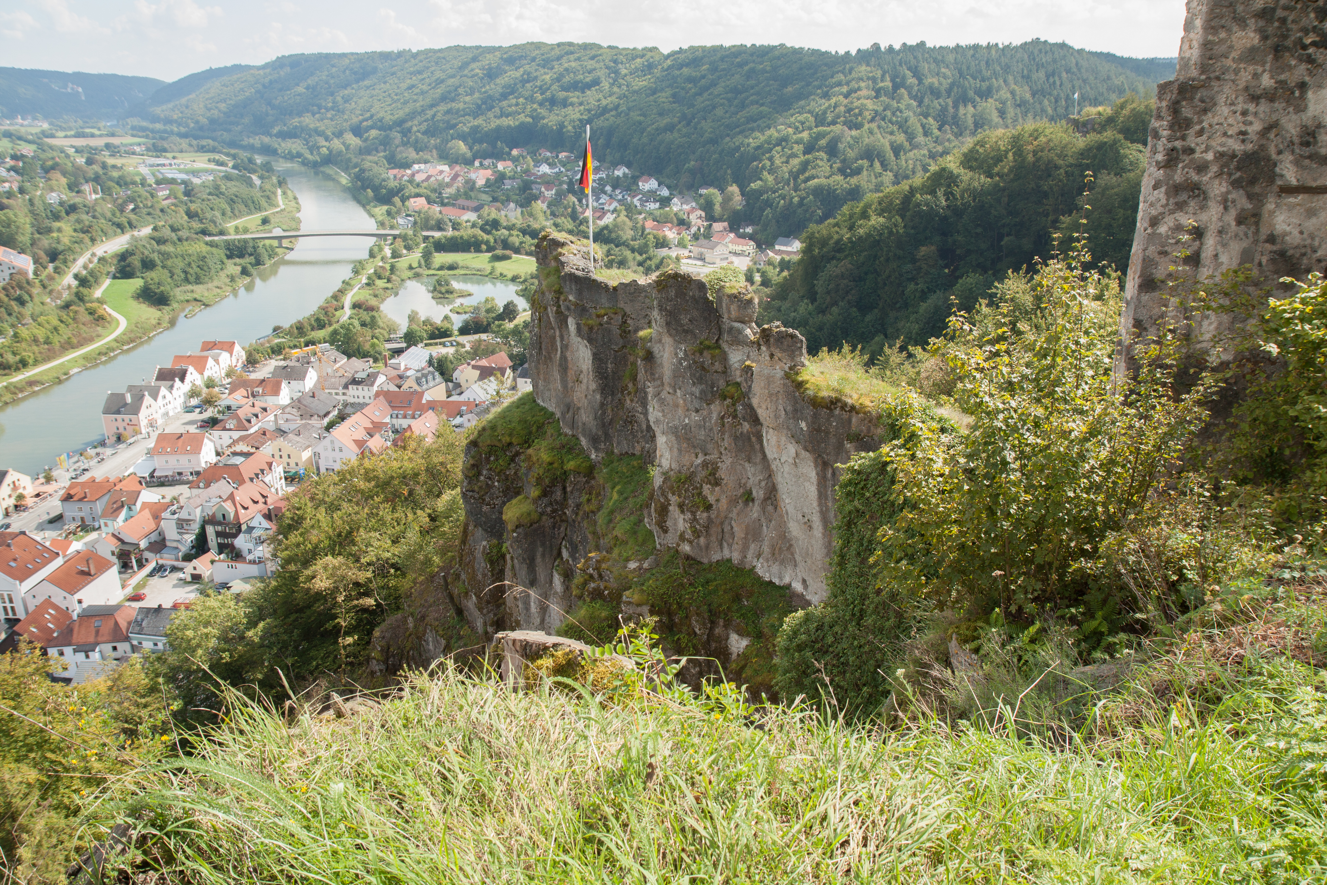 Burgruine Tachenstein - Auslaufender Felsgrat des Burgberges